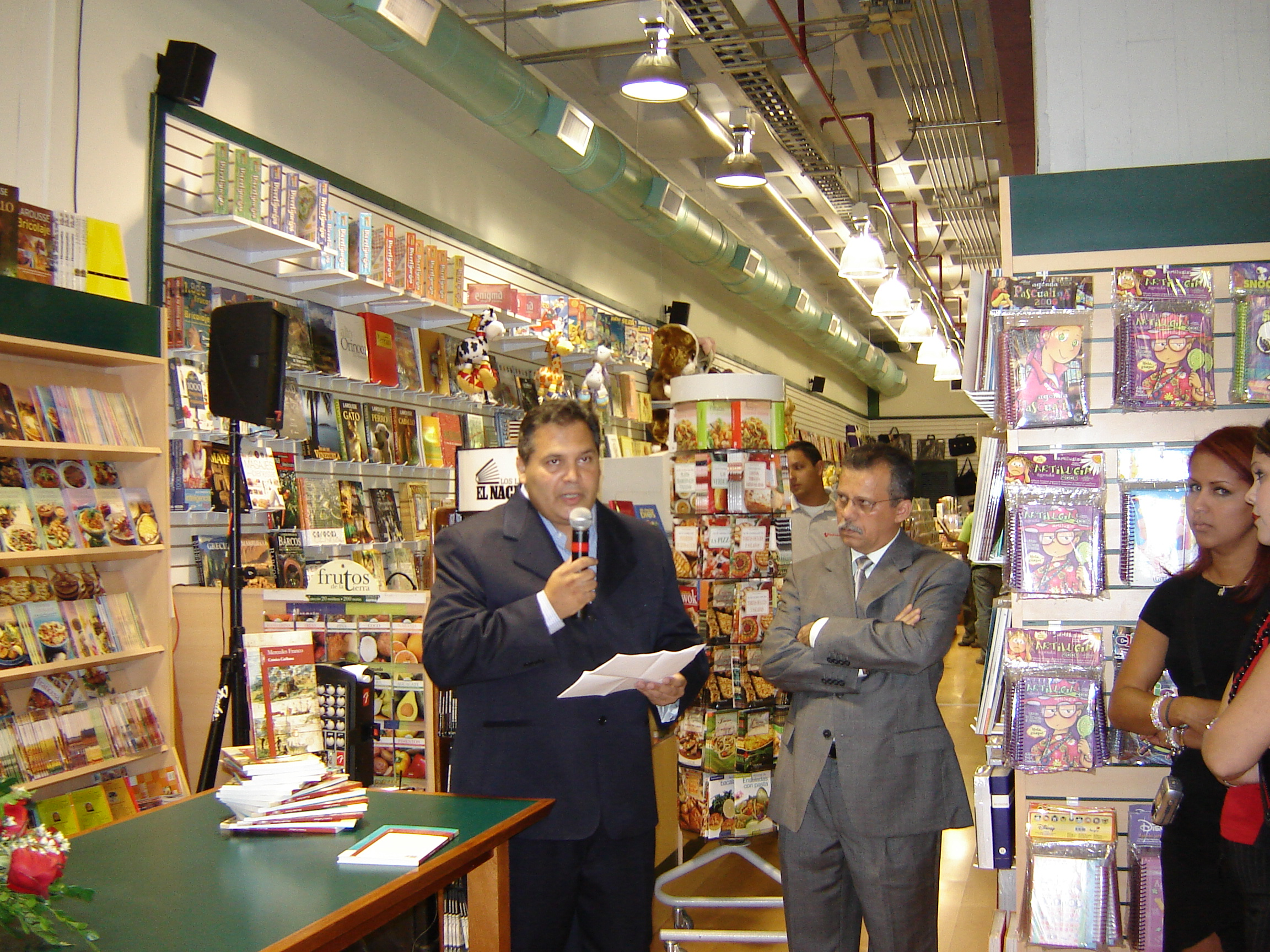 fotografía del poeta josé jesús villa pelayo en una librería de Caracas, Venezuela.